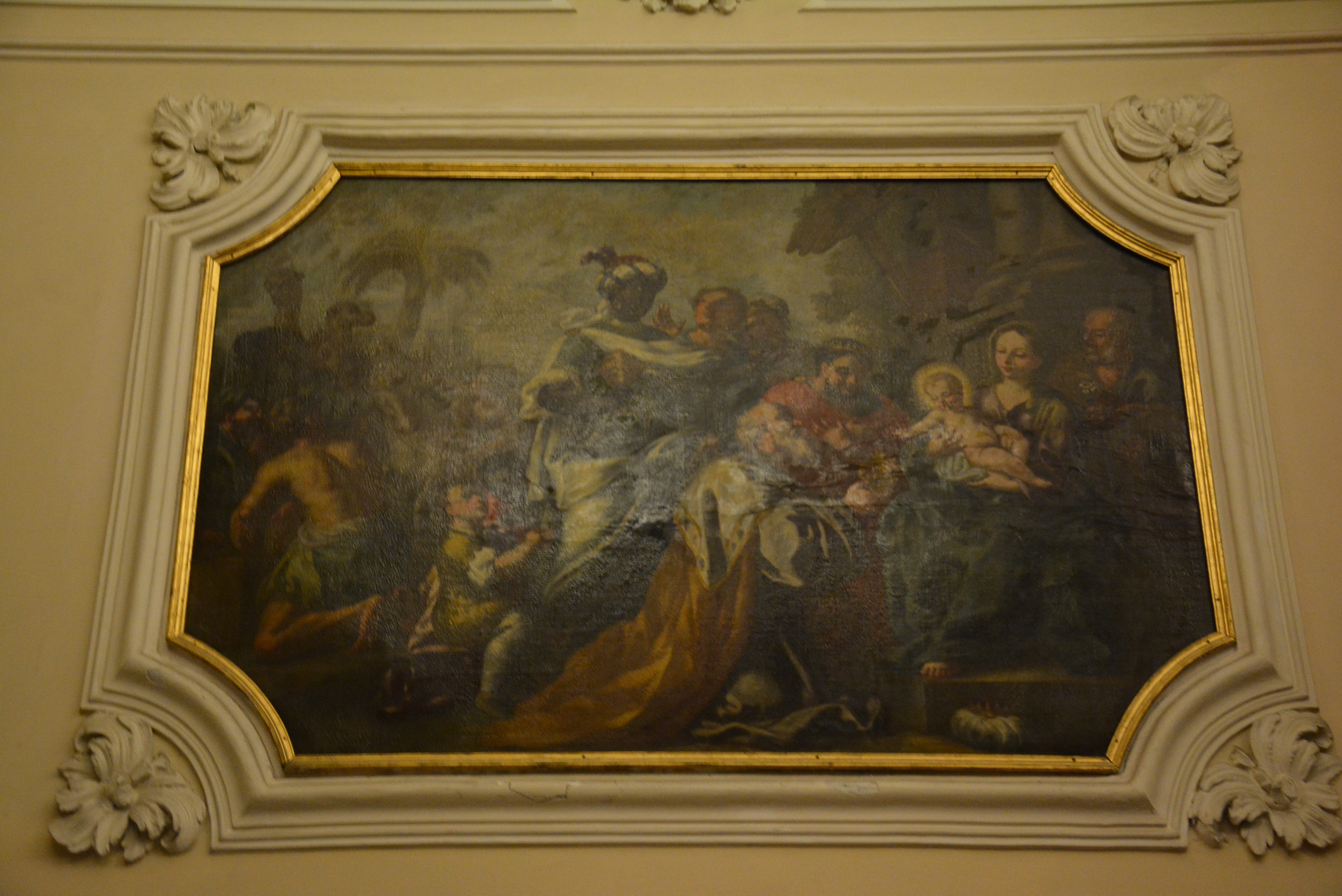 Santuario della Madonna del Carmine a Sorrento